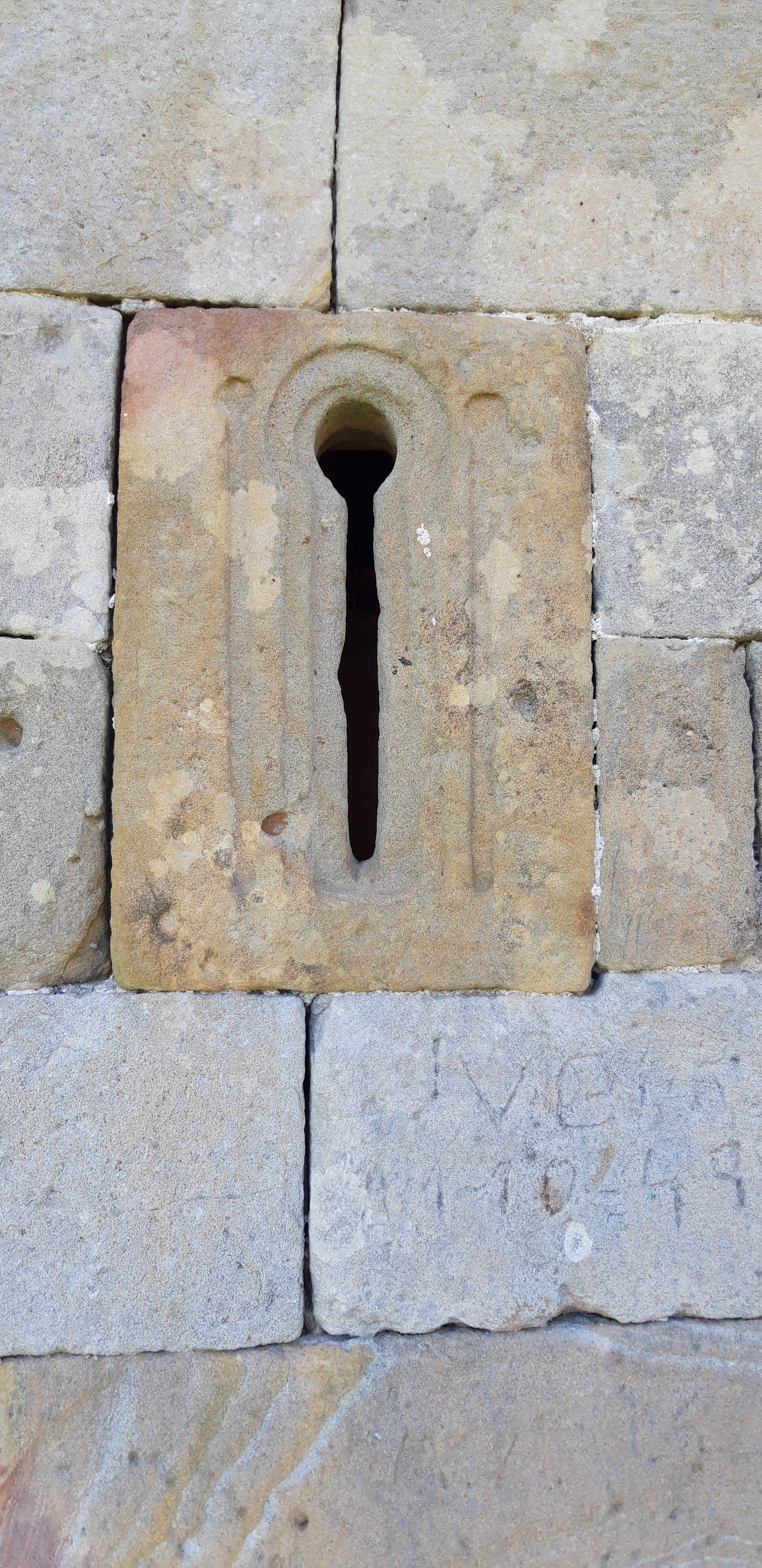 Zaludondoko Aistra auzo hustuan dagoen San Julian eta Santa Basilisa baseliza